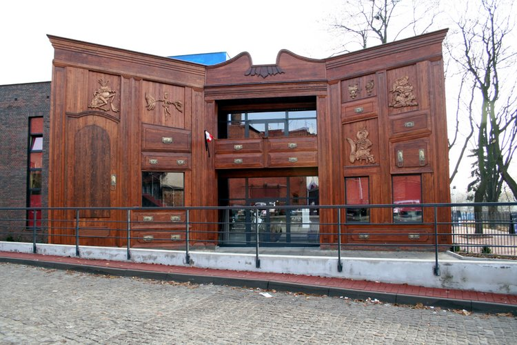 Theatre Baj Pomorski in Torun